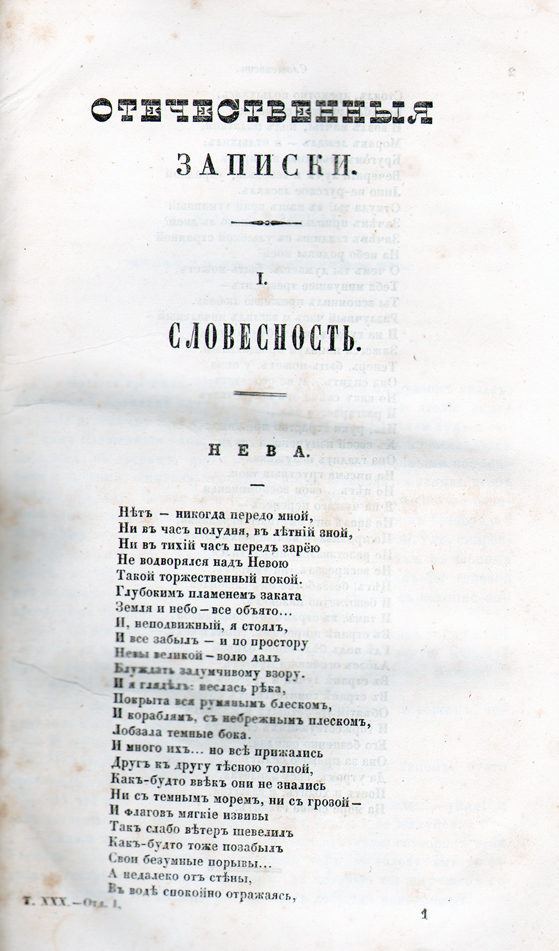 «Neva», poem by Ivan Turgenev